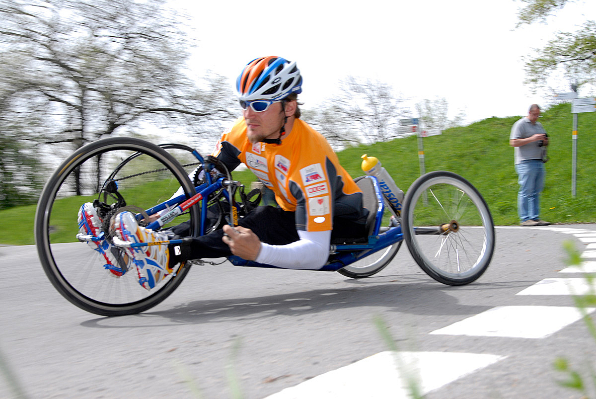 Der österreichische Behindertensportler Philippp Bonadimann.